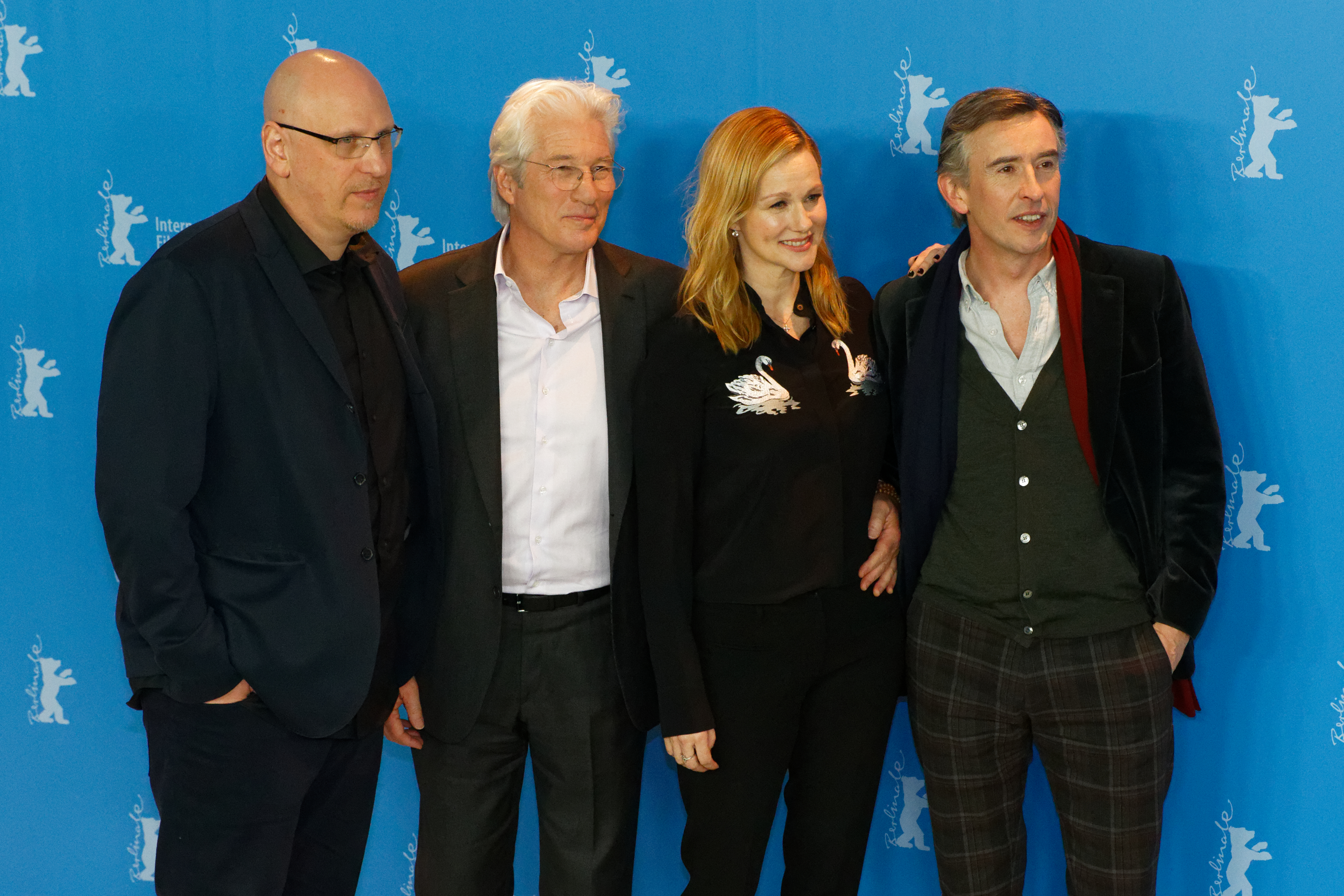 Oren Moverman & Cast von The Dinner bei der Berlinale 2017